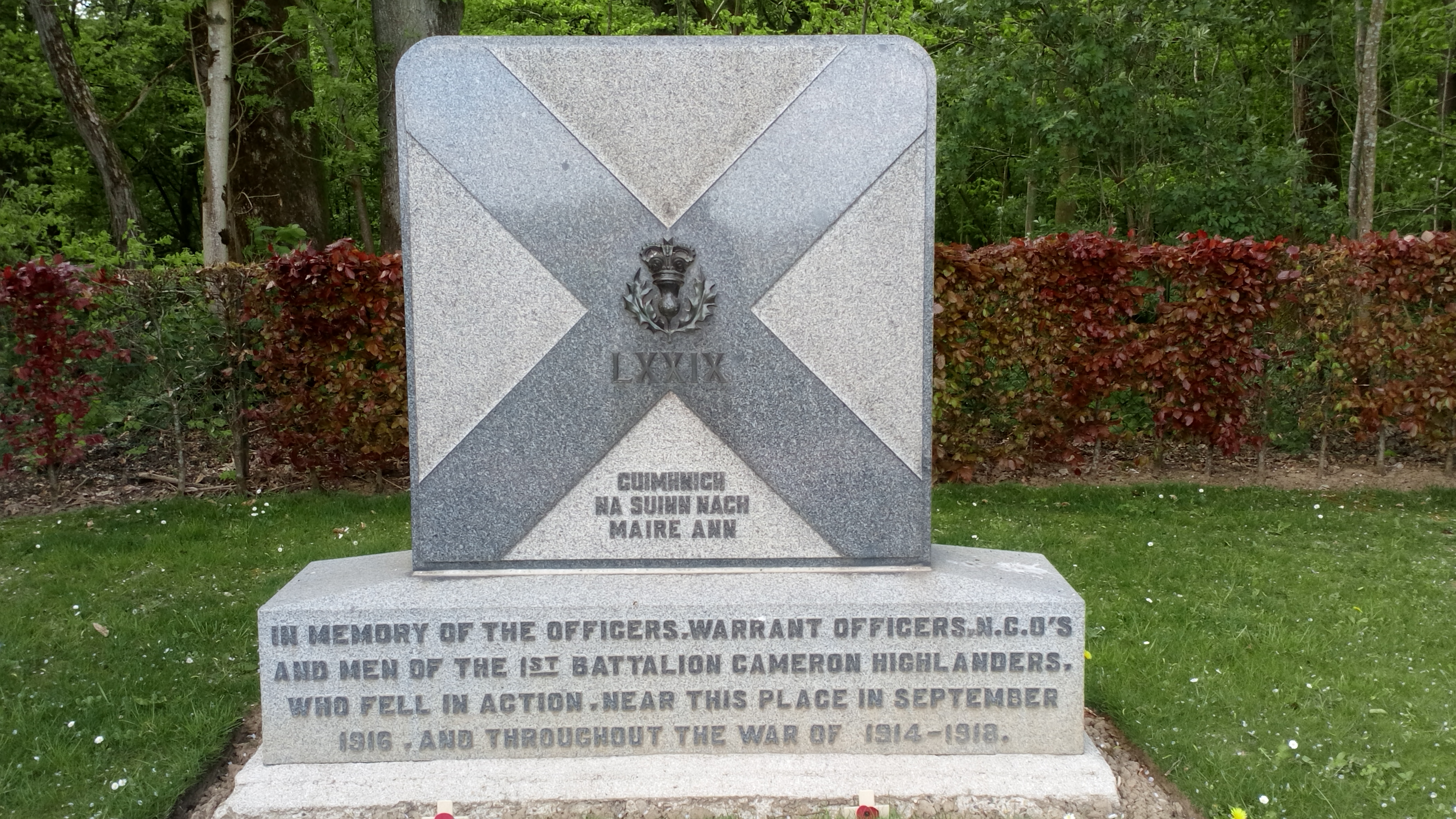 Bois des Fourcaux, monument écossais